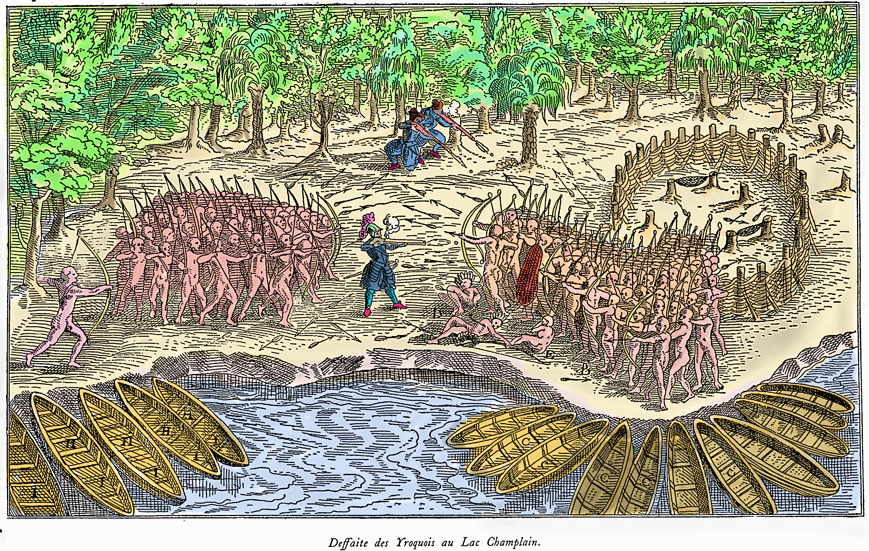 Défaite des Iroquois au lac Champlain (1609), dans Voyages de Champlain, tome III, publié en 1613, puis réimprimé en 1632. Desfaite des Yroquois au Lac Champlain. A (1} Le fort des Yroquois. B Les ennemis. C Les Canots des ennemis faits d'escorce de chesne, qui peuvent tenir chacun 10, 15, & 18 hommes. D. E. Deux chefs tués, & un blessé d'un coup d'arquebuse par le sieur de Champlain. F (2) Le sieur de Champlain. G (3) Deux Arquebusiers du sieur de Champlain. H (4) Montaignets, Ochastaiguins, Algoumequins. I Canots de nos sauvages aliés faits d'escorce de bouleau. K (5) Les bois. (1) Cette lettre manque dans le dessin.—(2) La lettre manque; mais il est facile de reconnaître Champlain posté seul entre les combattants.—(3) Cette lettre manque dans le dessin, mais on reconnaît aisément les deux arquebusiers sur la lisière du bois.—(4) La lettre H a été mise par inadvertance sur les canots des alliés, où il y a déjà la lettre I.—(5) Cette lettre, qui manque aussi, est facile à suppléer. Image d'origine sans couleur.